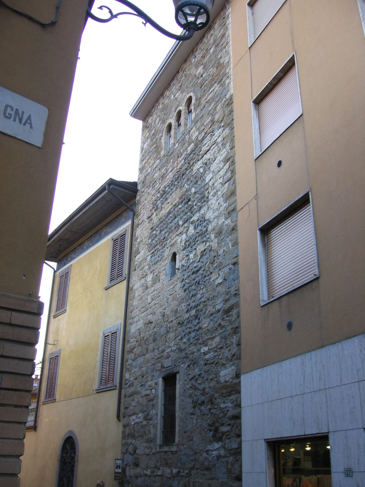 Villa di Serio, Bergamo, Italia